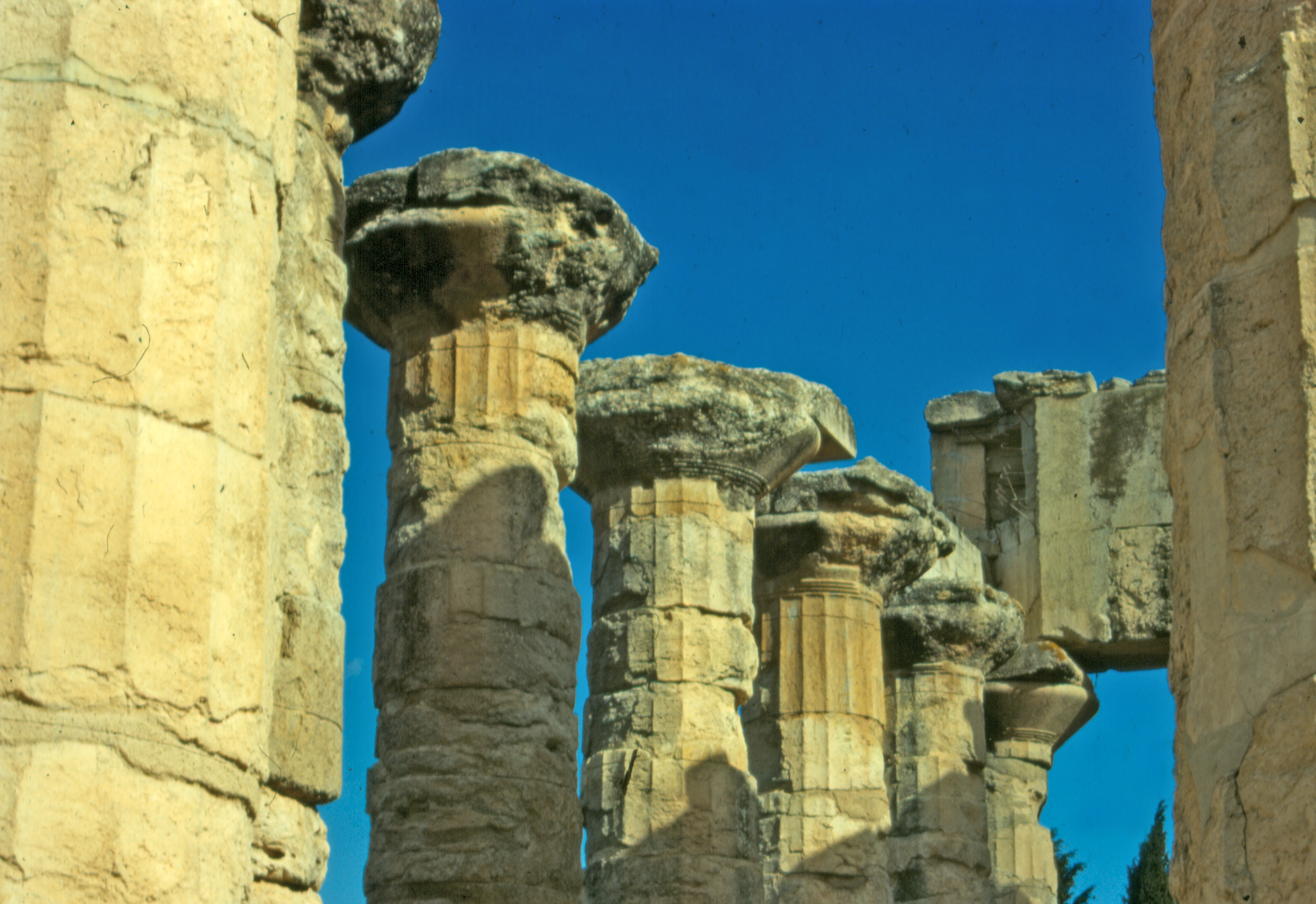 Libia, Cirene (sito archeologico), Tempio di Zeus, interno, particolare